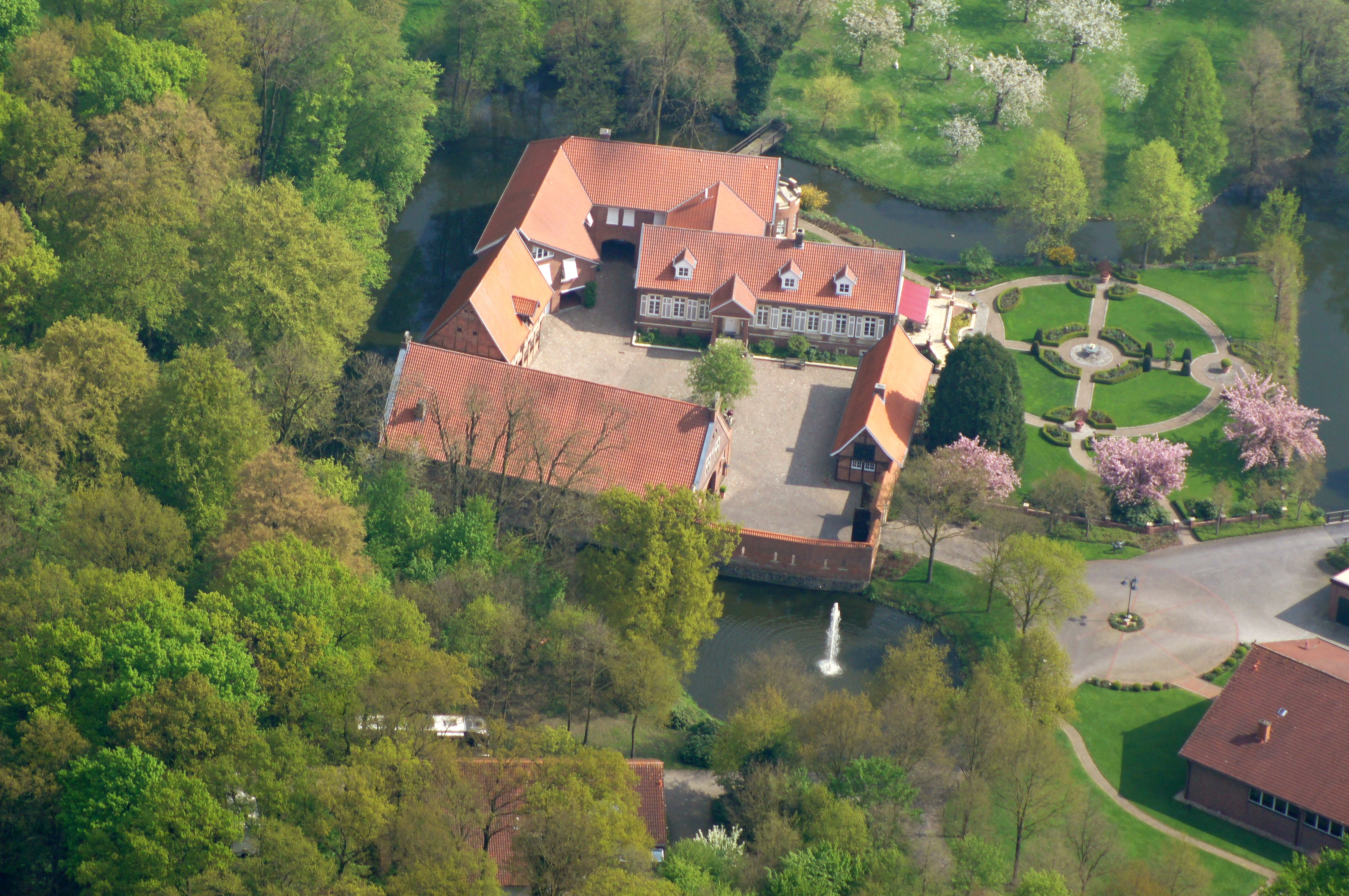 Haus Giesking; die Aufnahme entstand während des Münsterland-Fotoflugs am 12. April 2014.